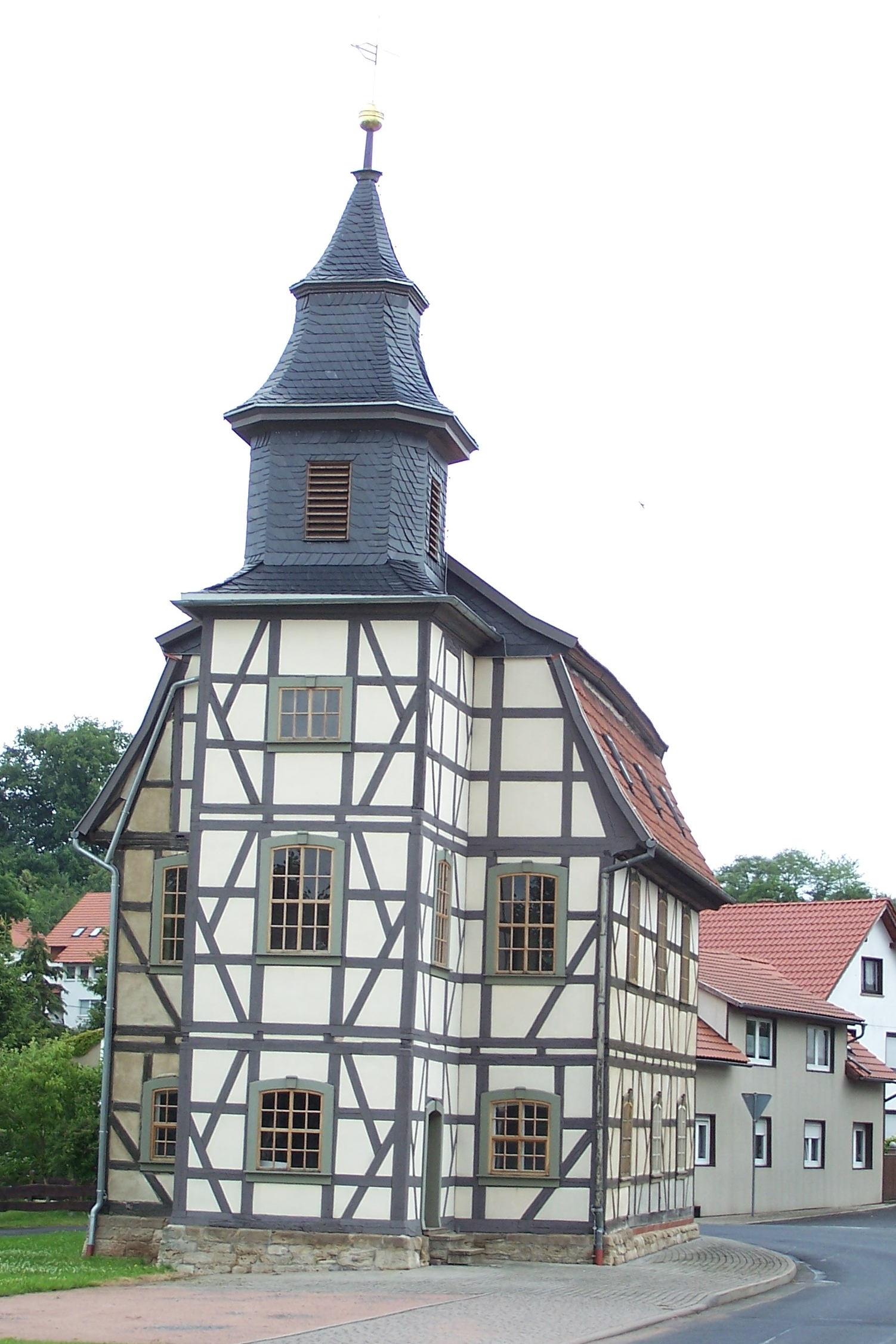 Ansichten und Details zur Fachwerkkirche Burkhardtroda.